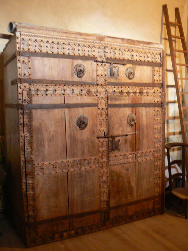 Sainte-Marie de Corneilla-de-Conflent, armoire ou vestiaire mozarabe.